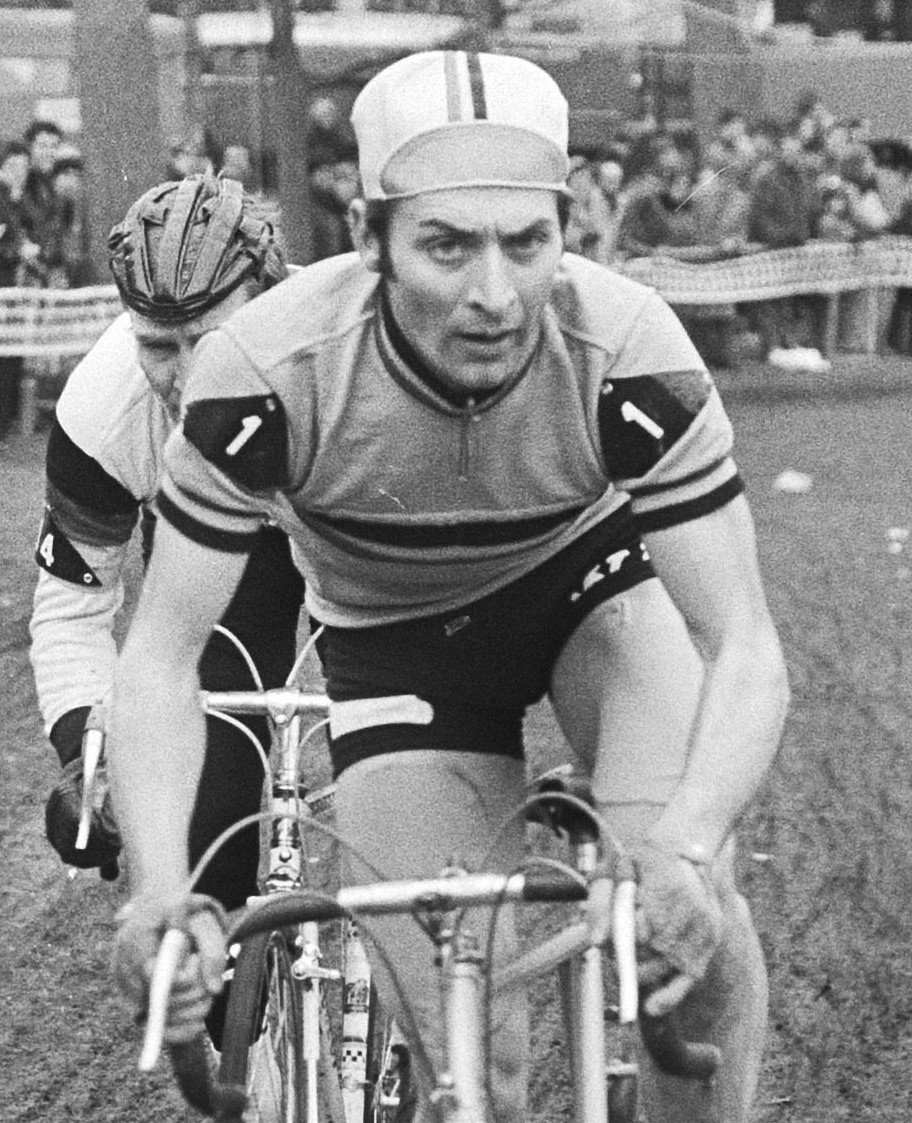 Collectie / Archief : Fotocollectie Anefo Reportage / Serie : [ onbekend ] Beschrijving : Wereldkampioenschappen veldrijden op de fiets, Apeldoorn; nr. 4, 6: Robert Vermeire in aktie;(...) Datum : 28 februari 1971 Trefwoorden : VELDRIJDEN, fietsen Persoonsnaam : (...) Fotograaf : Mieremet, Rob / Anefo Auteursrechthebbende : Nationaal Archief Materiaalsoort : Negatief (zwart/wit) Nummer archiefinventaris : bekijk toegang 2.24.01.05 Bestanddeelnummer : 924-3110